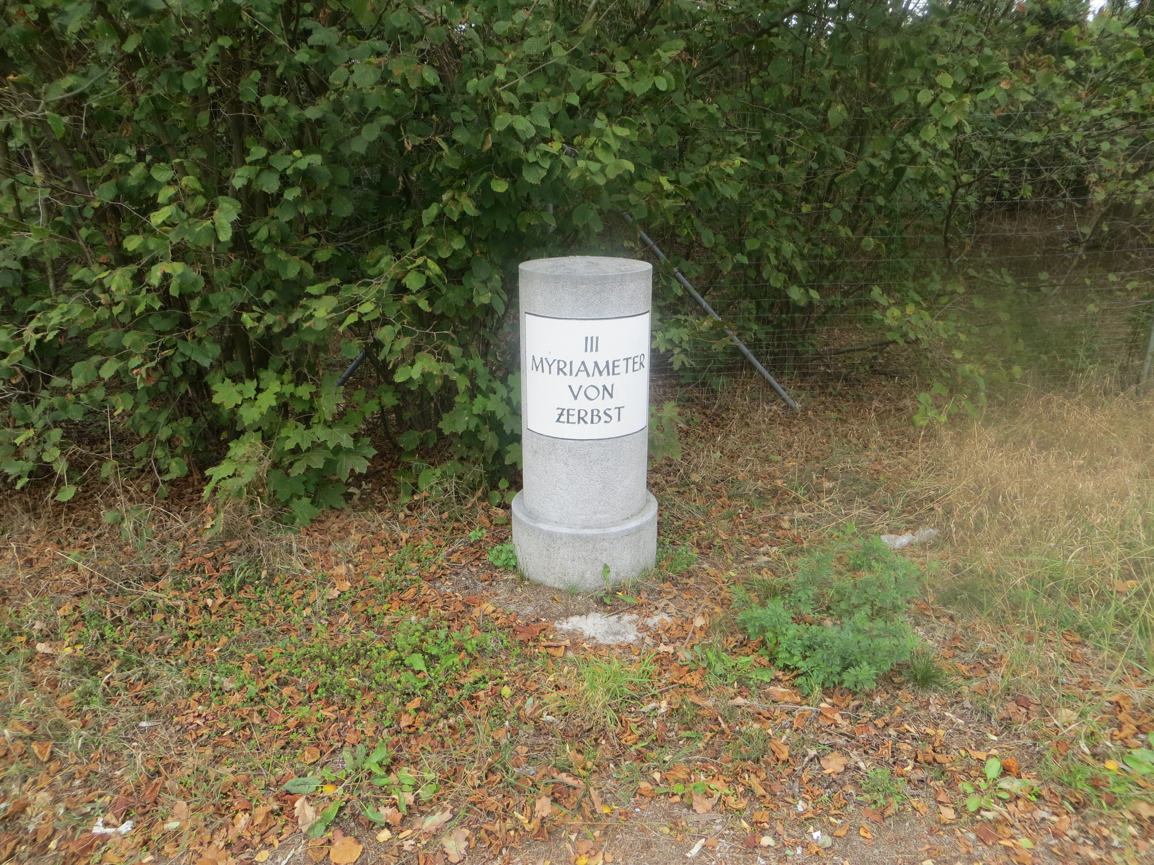 Autobahnabfahrt Köselitz, Replik eines Anhaltinischen Rundsockelsteins „III MYRIAMETER VON ZERBST“ an der Bundesstraße 107